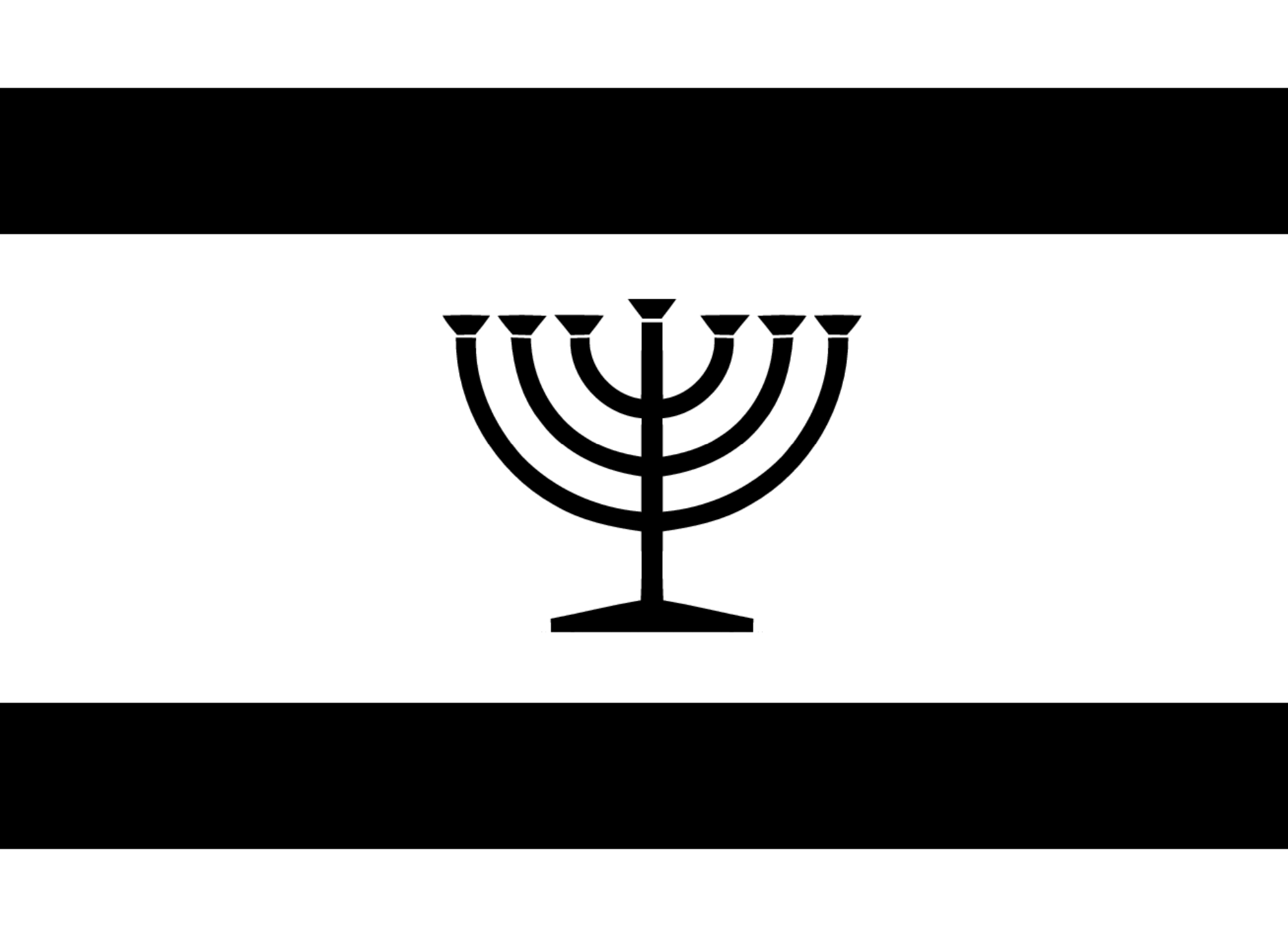 ייִדיש: די פֿאָן פֿון ײִדישער שפּראַך און קולטור